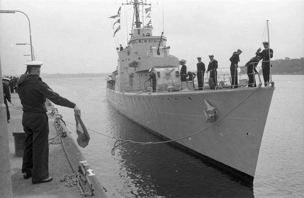 Ankunft des dänischen Flottenverband von 14 Schiffen mit 800 Mann Besatzung zur Kieler Woche 1963. Im Bild die Fregatte HUITFELDT (P 520, dän.).